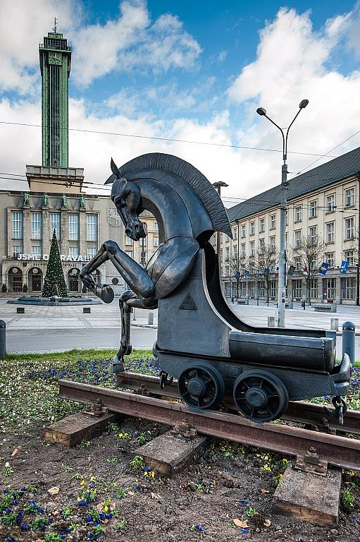 Radnice v Ostravě.